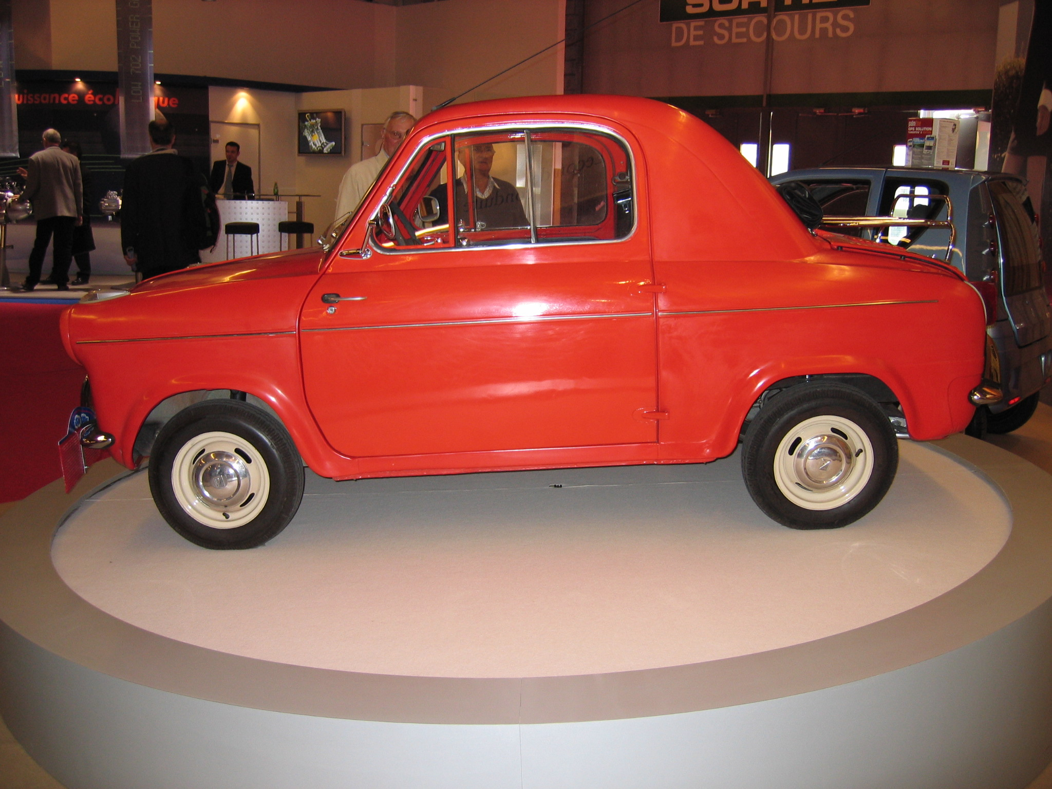 Vespa 400 op het Parijse autosalon van 2004. Eigen werk, vrij voor het publiek.